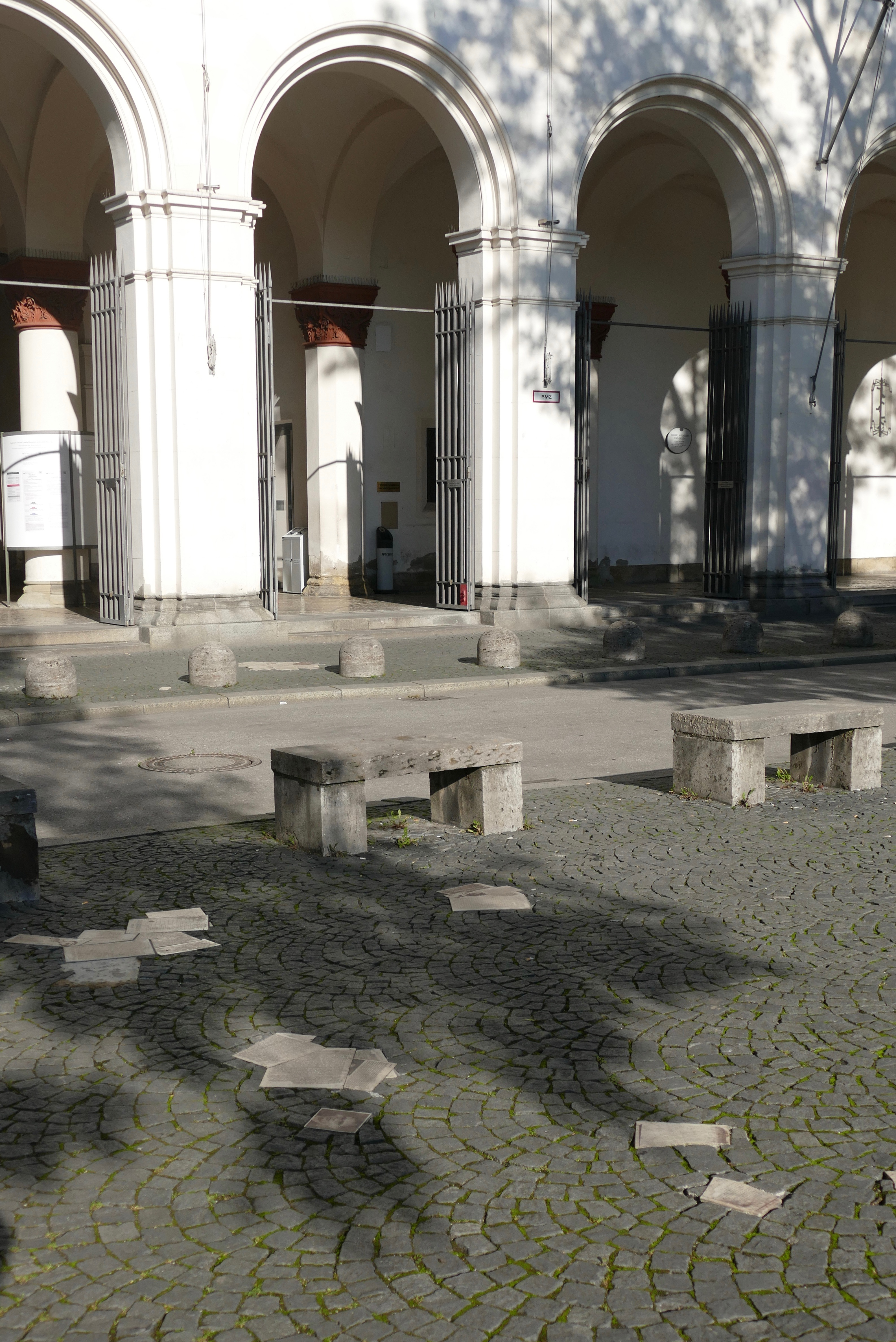 Das Weiße-Rose-Mahnmal auf dem Geschwister-Scholl-Platz vor der Ludwig-Maximiliansuniversität erinnert mit verstreuten Flugblättern (in Stein eingelassen) an die Flugblattaktionen der Weißen Rose. Die Flugblätter liegen nicht zufällig verstreut, sondern bilden thematische Gruppen.